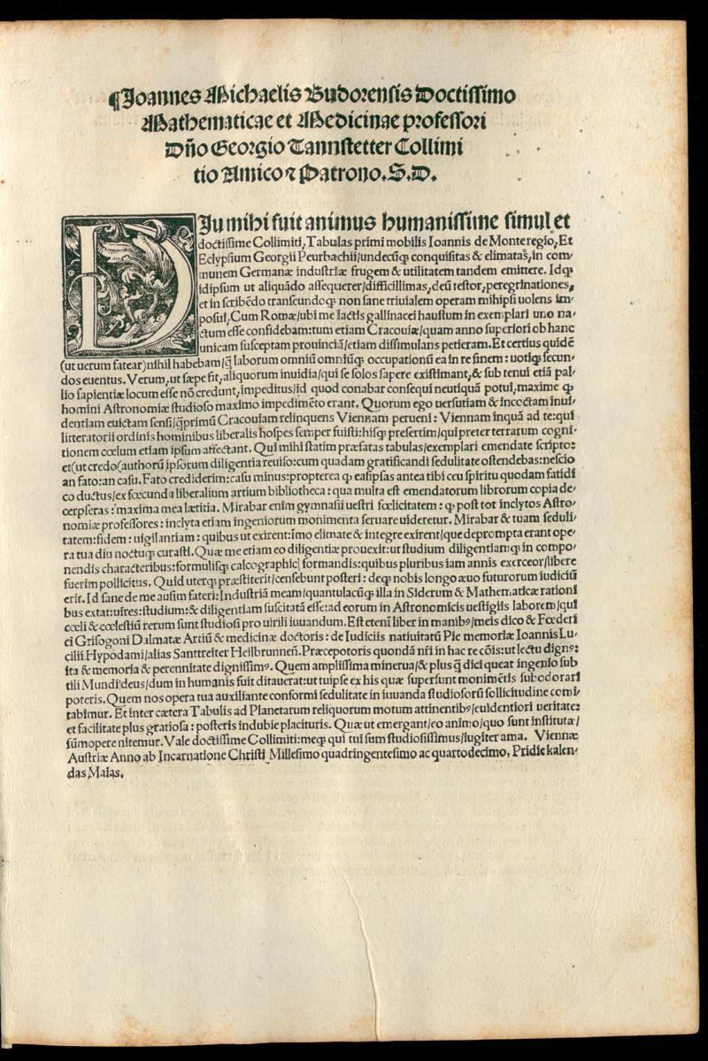 Tabulae eclypsium S.21